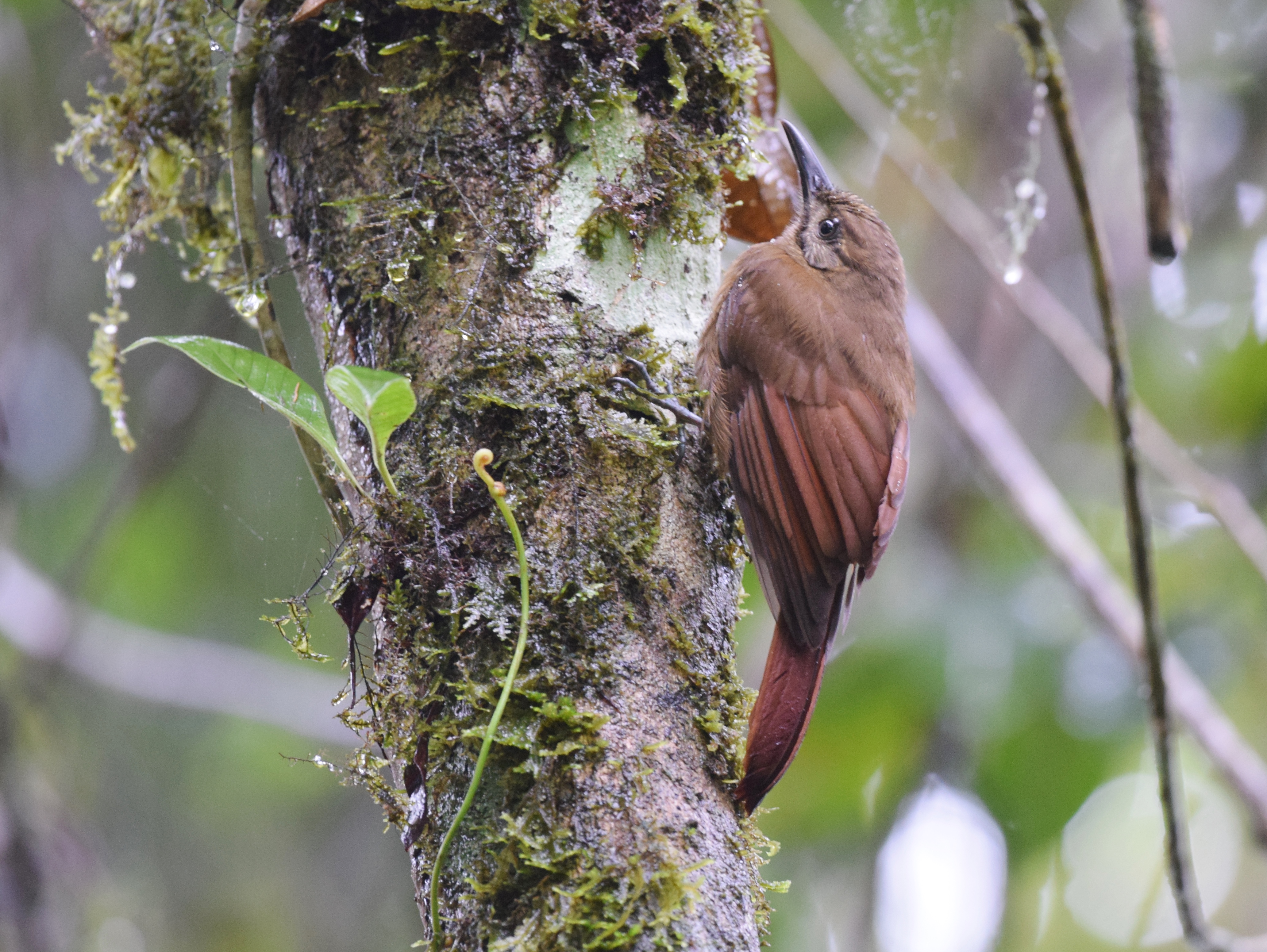 Costa Rica - 2/11/16 CATIE, Casa Turire and Laguna Angostura